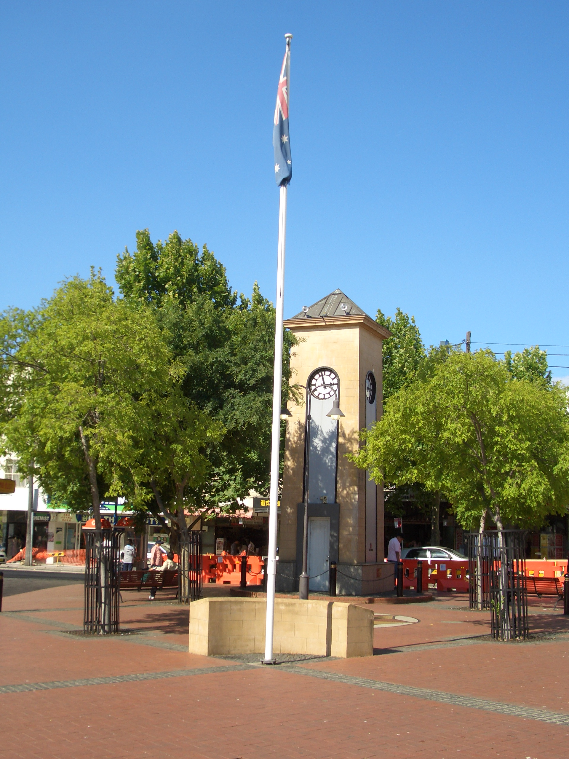 Campsie